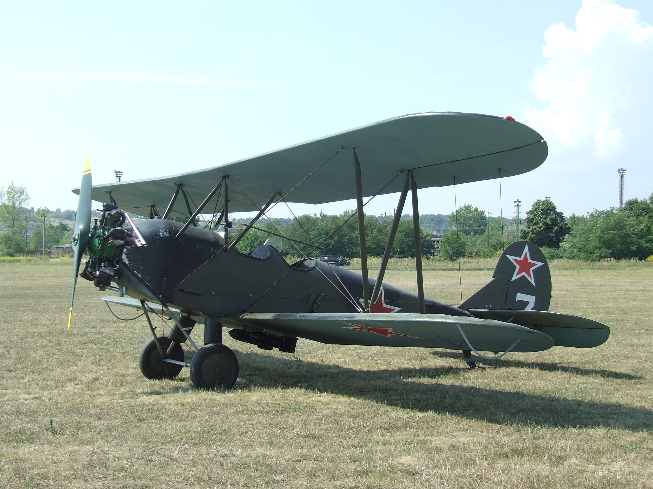 По-2, он же У-2, многоцелевой биплан, созданный под руководством Н. Н. Поликарпова в 1927 году.